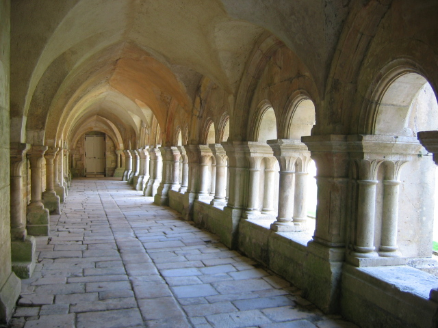 Abbaye de Fontenay, France : cloître.